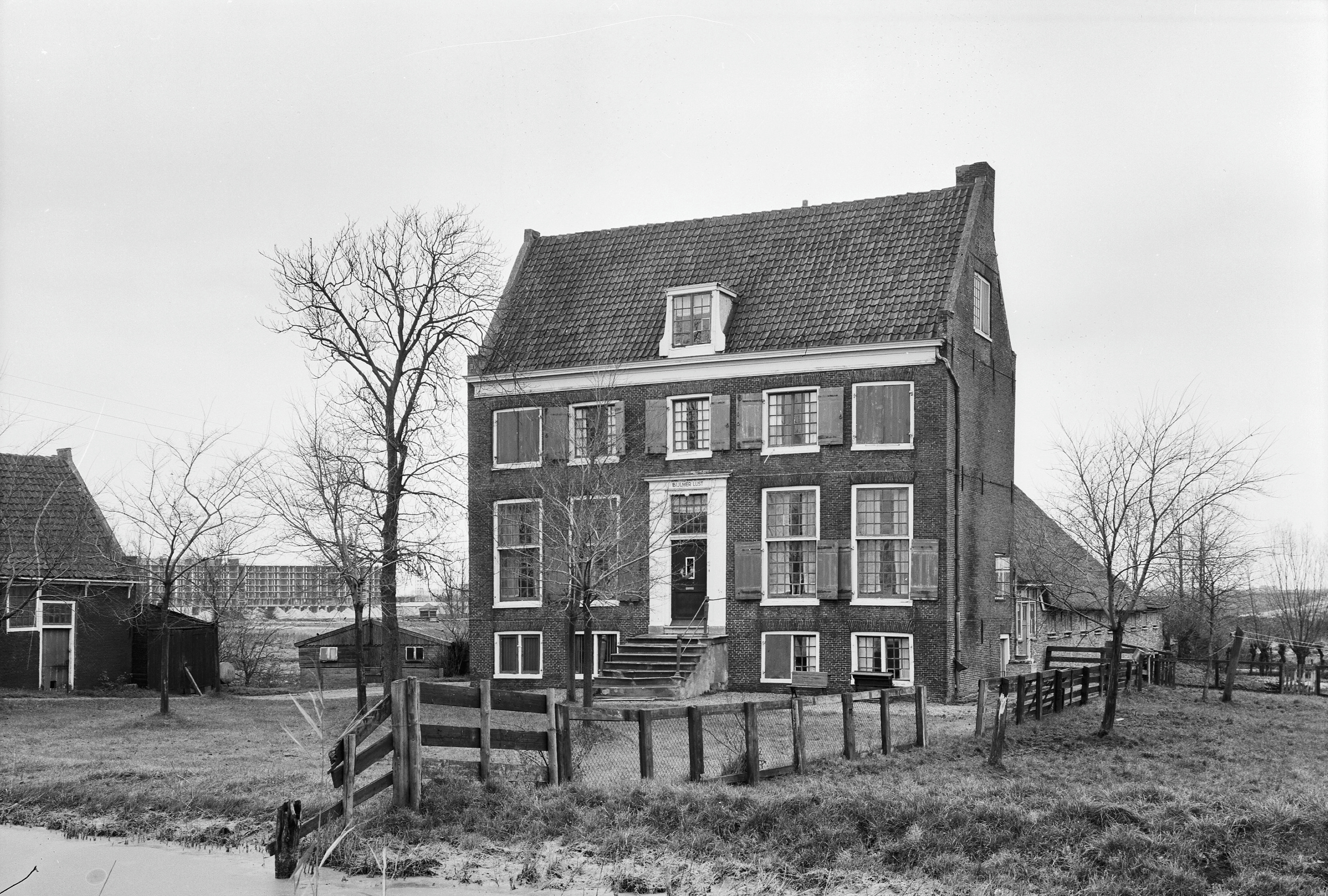 Bijlmer Lust: Groot bakstenen huis met aangebouwde boerderij, omlijste ingangspartij met bordes (opmerking: Huis is inmiddels verplaatst)